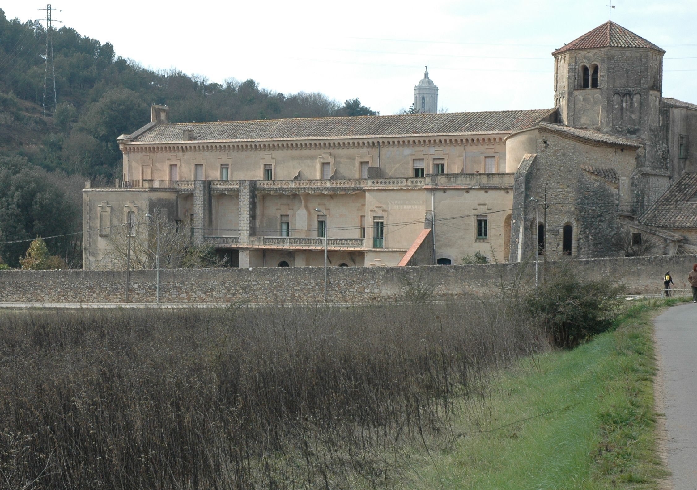 Monestir de Sant Daniel de Girona